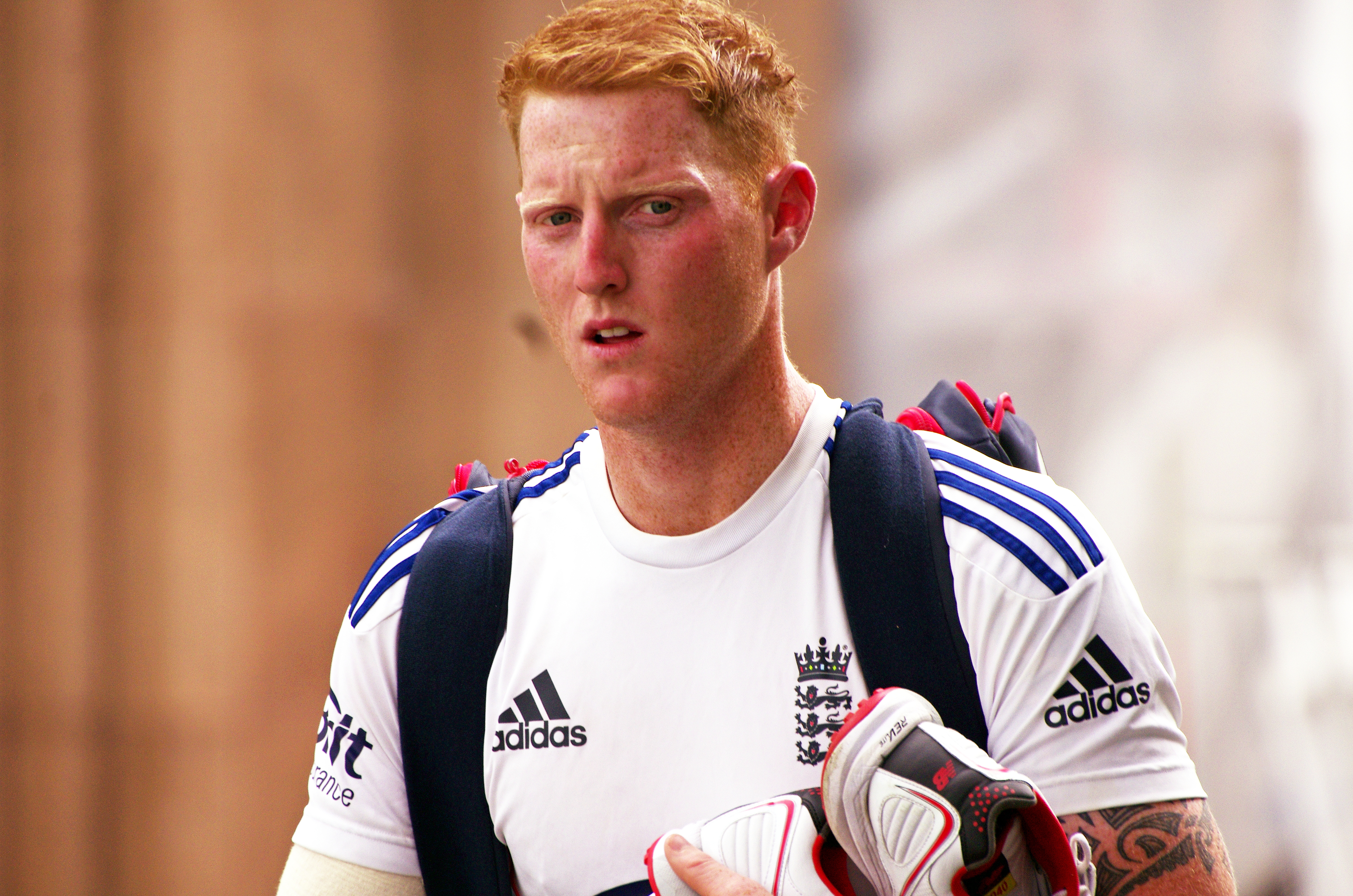 Ben Stokes in 2014